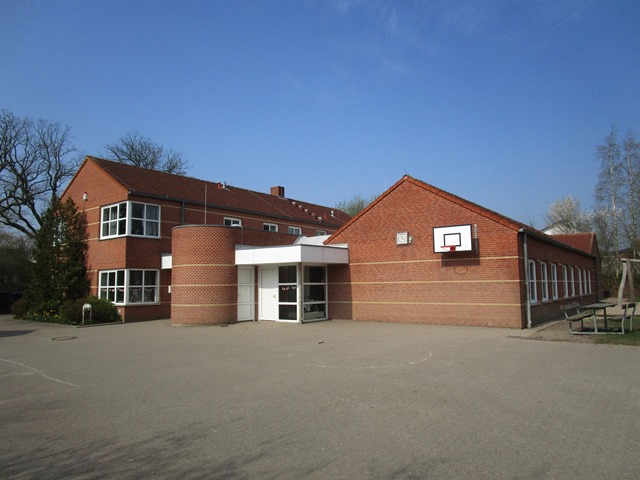 Jernved danske Skole i Dänischenhagen